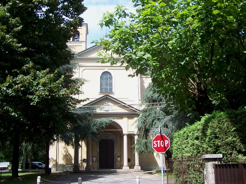 Ornago - Santuario della Beata Vergine del Lazzaretto[1]